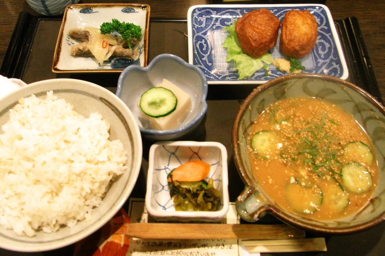 12/2の空港での夕食『冷や汁定食』。御飯、冷や汁。右上は「飫肥の天ぷら（おび天）」でja:薩摩揚げのようなものだが中身は豆腐である。